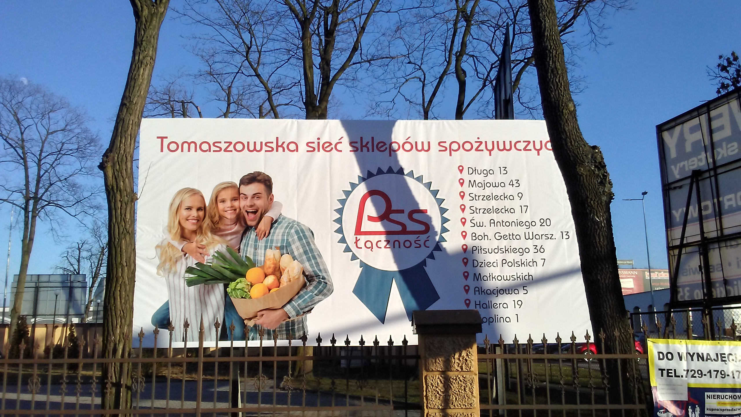 Sieć spółdzielczych sklepów spożywczych PSS Społem w Tomaszowie Mazowieckim